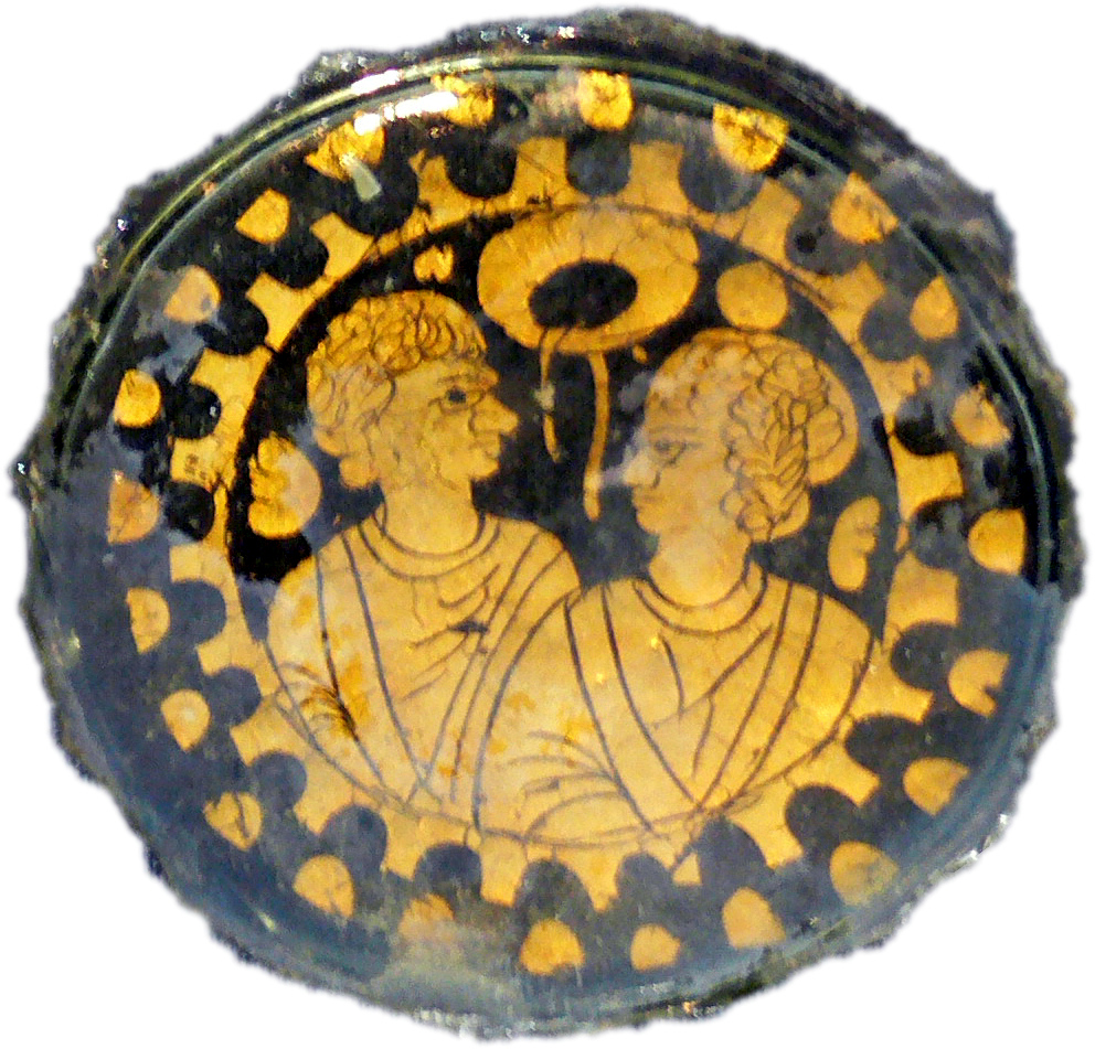 Wien, Kunsthistorisches Museum, Antikensammlung, Bodenfragment eines Glasbechers, Motiv: zwei Heilige, spätrömisches Zwischengoldglas, 4. Jh. n. Chr., Inv. Nr. XIa 37